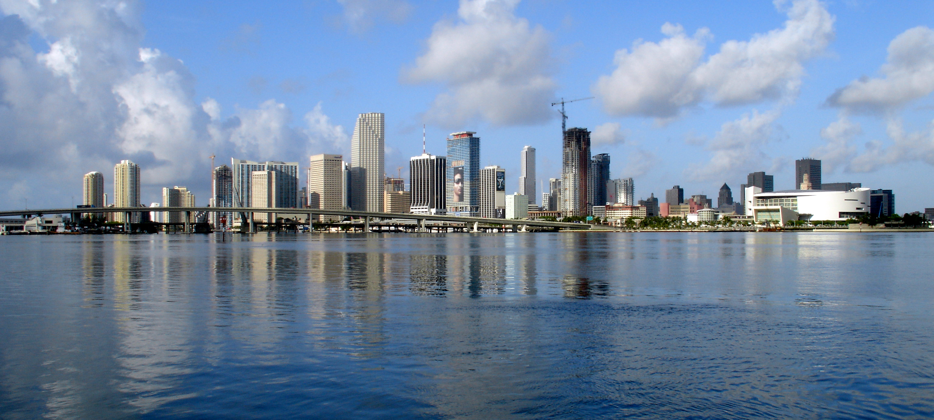 Miami Skyline